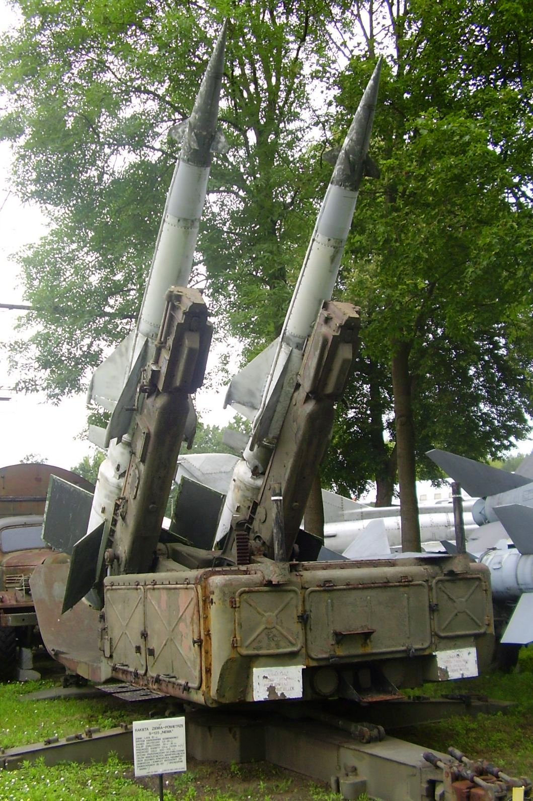 Rakieta Ziemia-Powietrze S-125 "Newa"